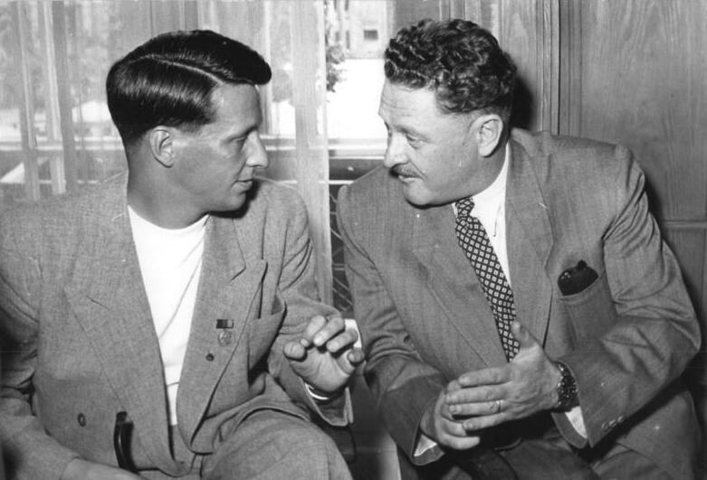 Zentralbild-Gielow 23.5.52 III.Deutscher Schriftstellerkongreß vom 22.-25. Mai 1952 in Berlin. UBz: Stephan Hermlin (links) im Gespräch mit dem türkischen Schriftsteller Nazim Hikmet.